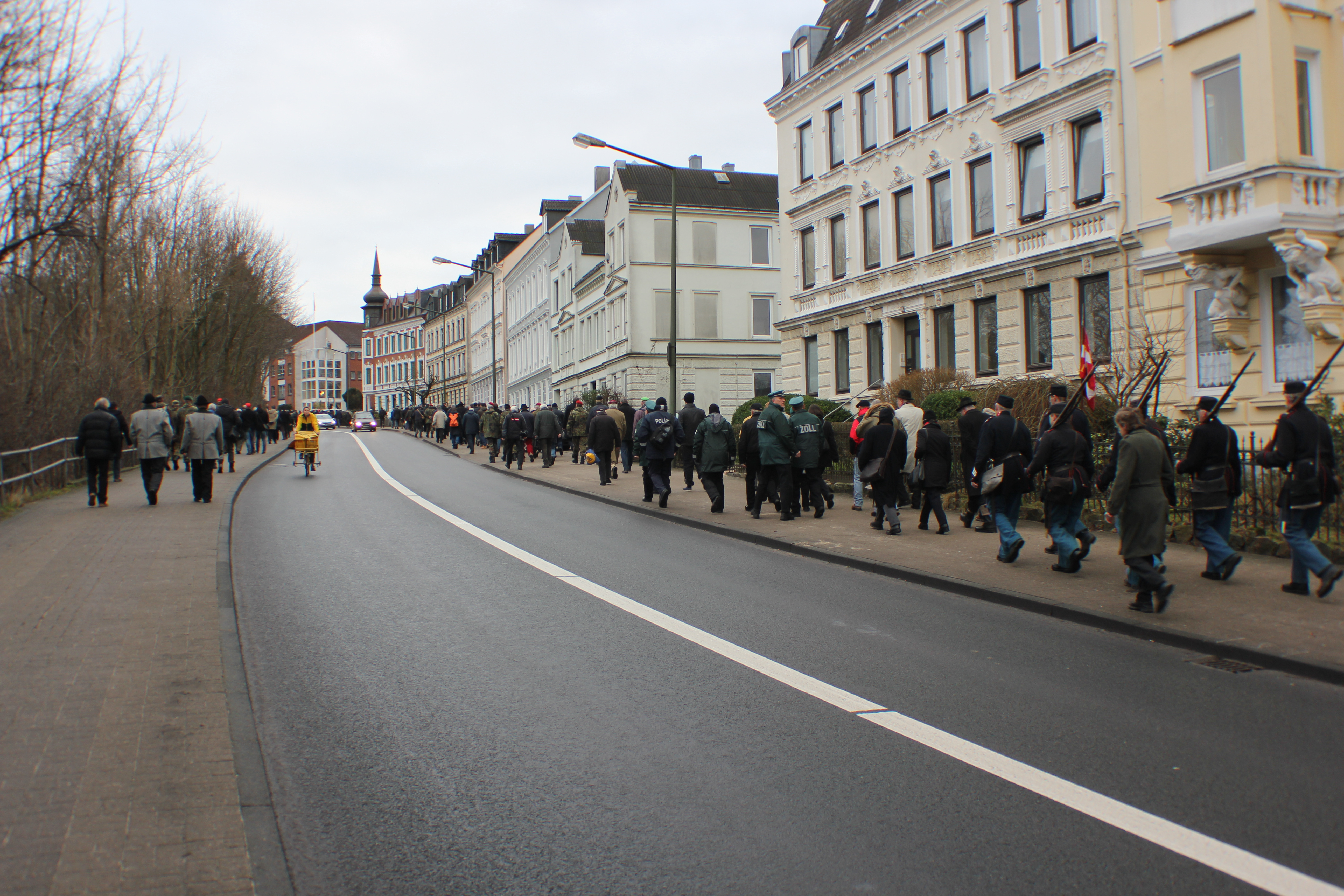 Von Flensburg nach Oeversee marschieren (150. Oeverseegedenken, 2014), Bild 05